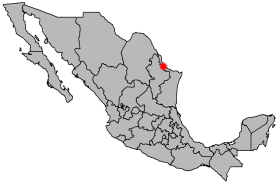 Location of Nueva Ciudad Guerrero, Tamaulipas, Mexico